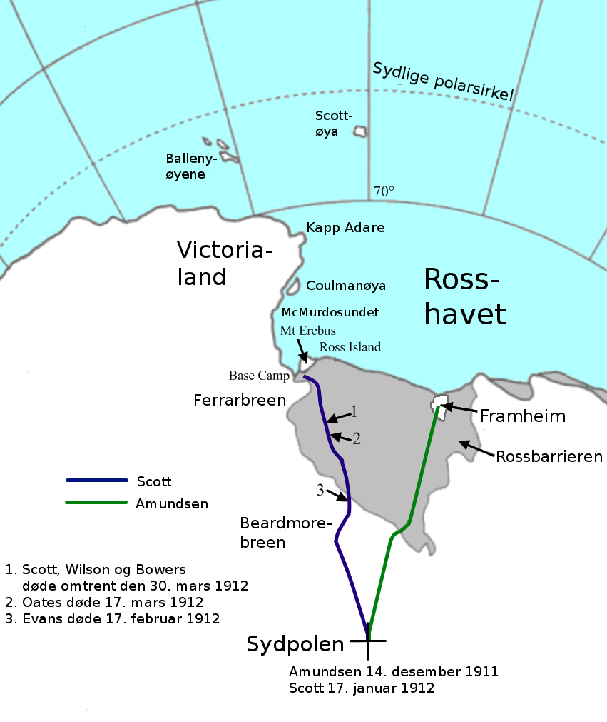 Kart over Scott og Amundsens ekspedisjoner til Sydpolen, 1911-12.